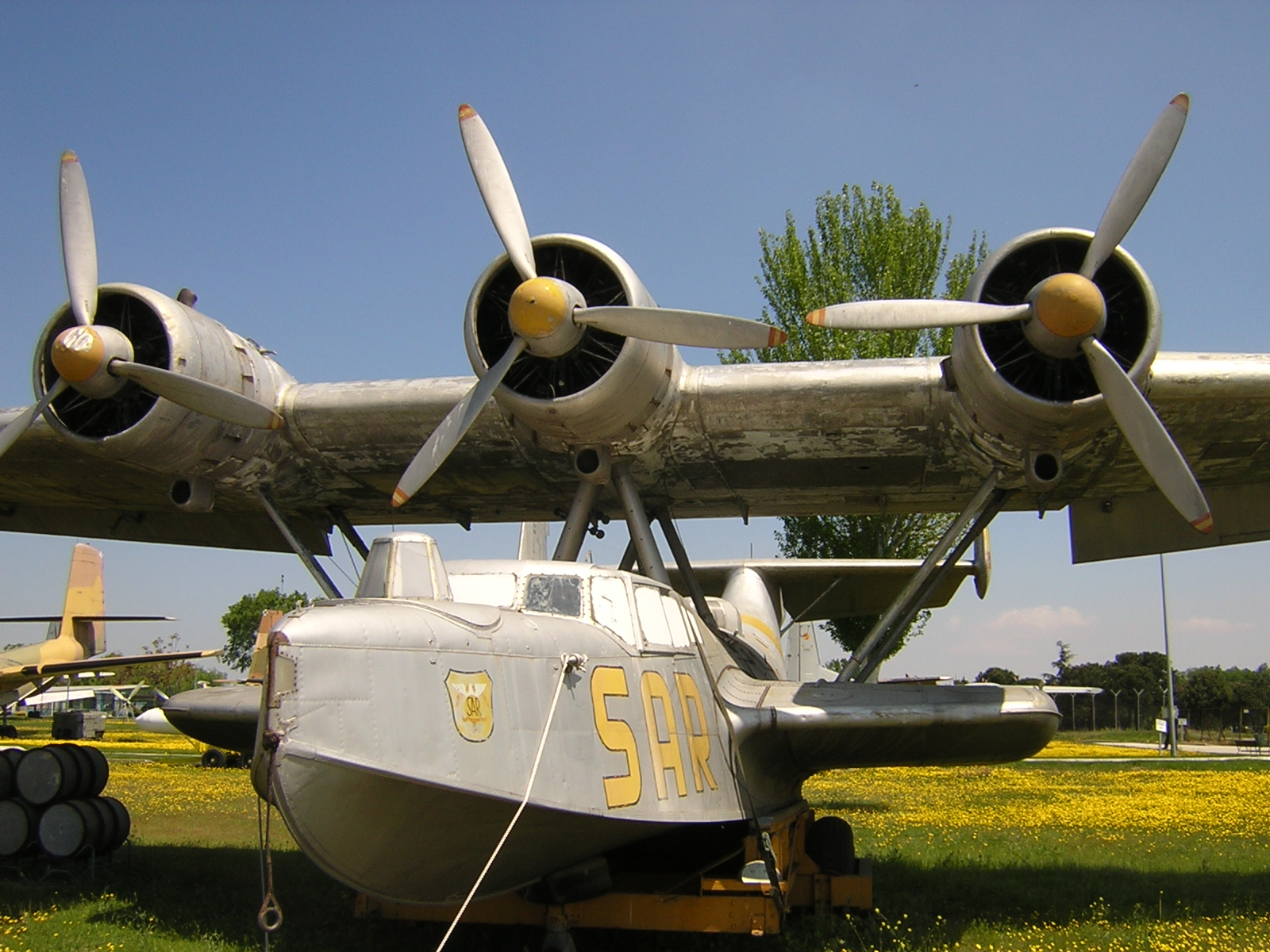 Un Dornier Do 24, perteneciente al Ejército del Aire de España, ahora expuesto en el Museo del Aire en Cuatro Vientos, Madrid.